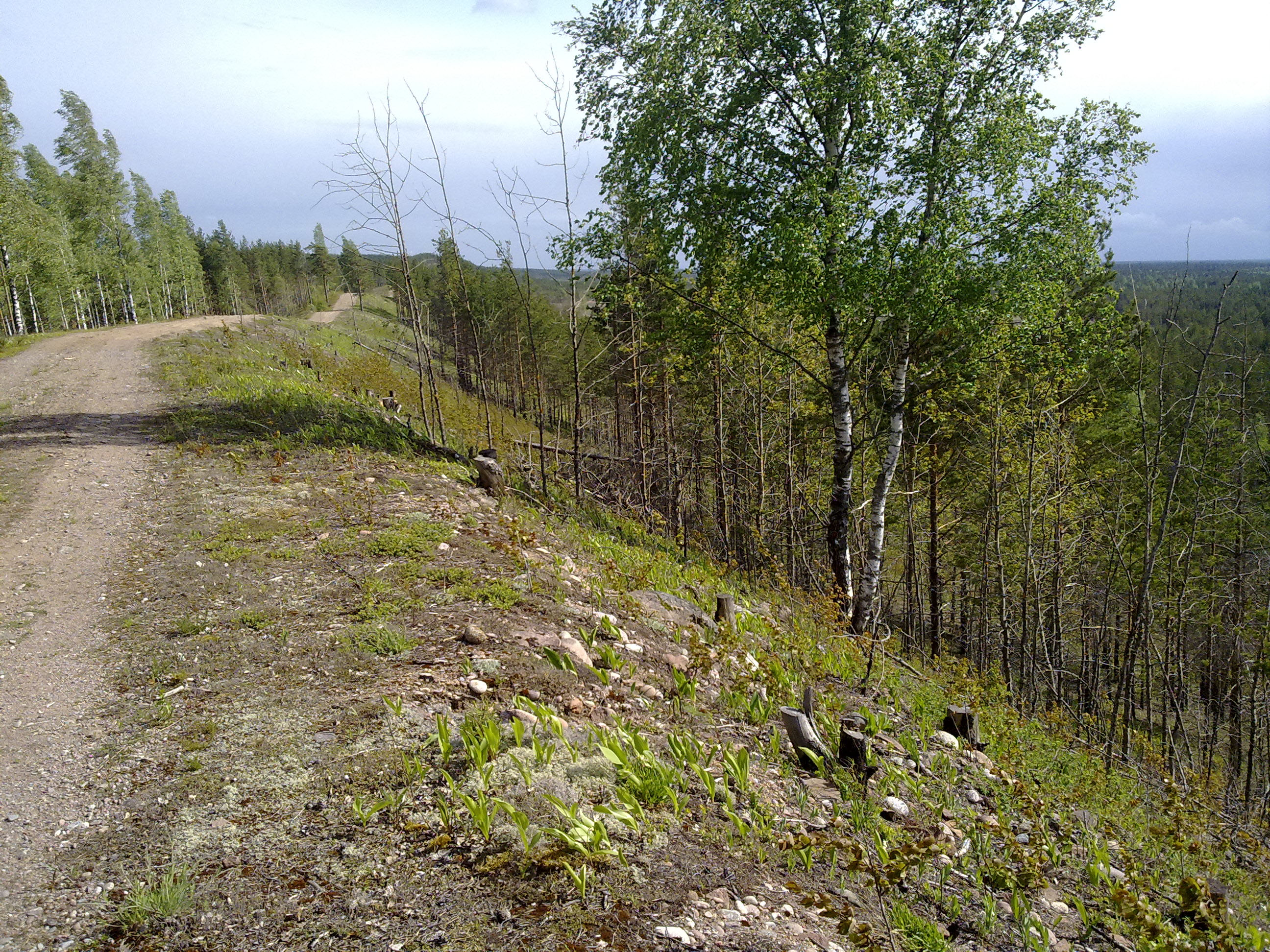 Kuva Säkylänharjun päältä, Säkylän varuskunnan alueelta.